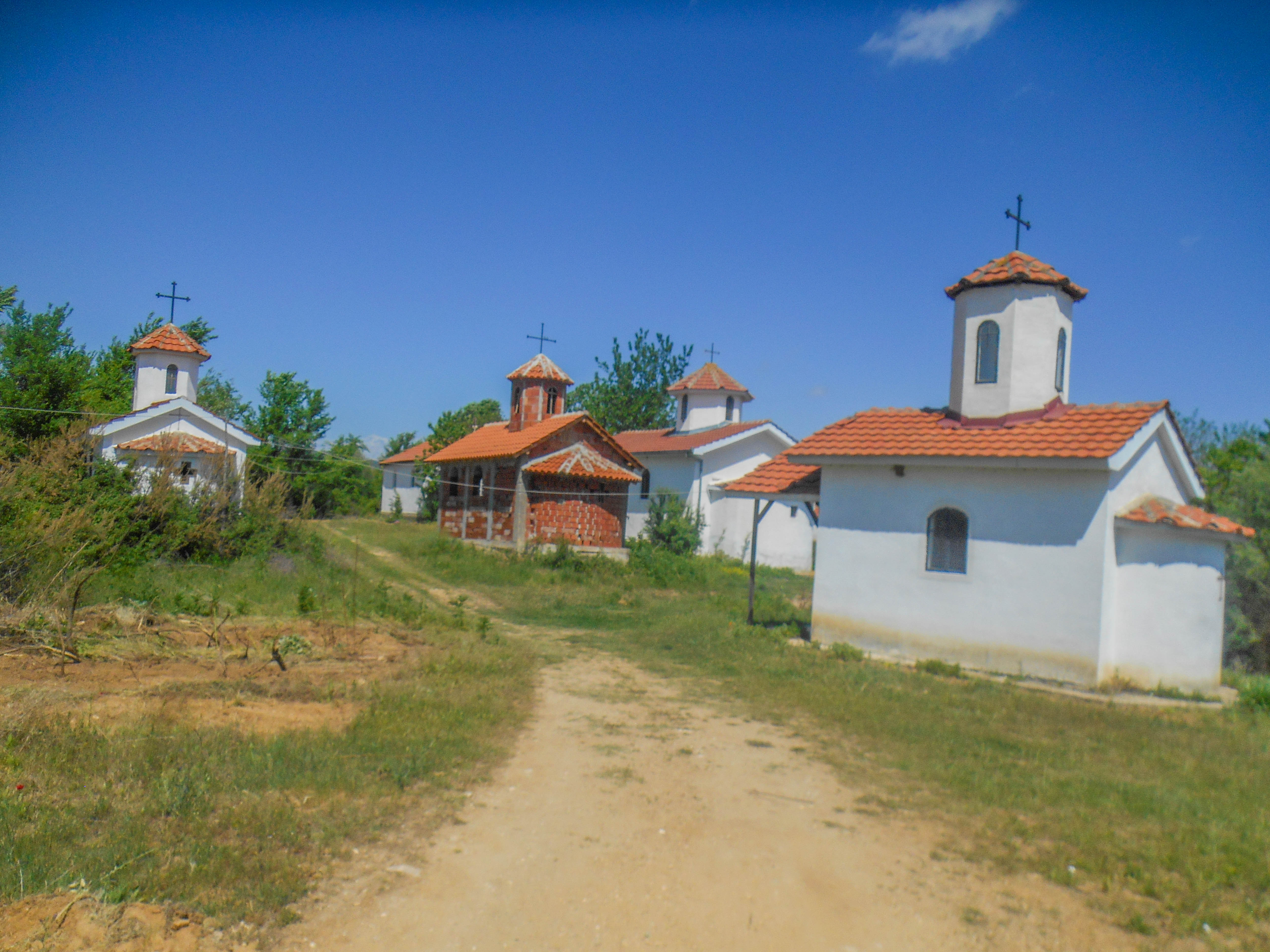 Манастирски комплекс (Ангелци)